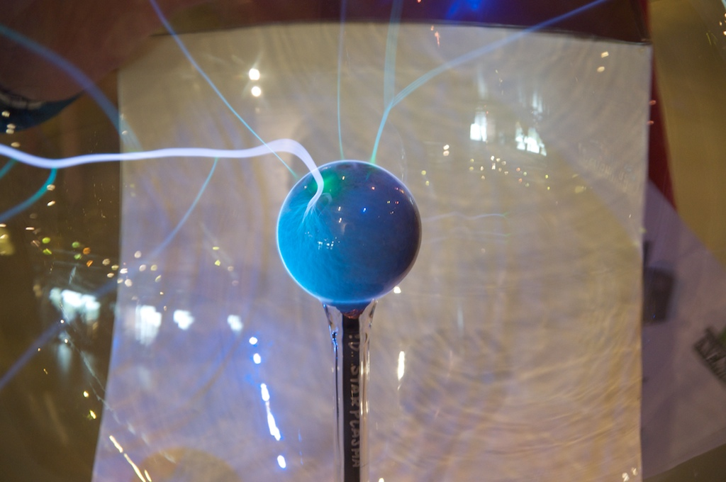 Teslabol, 1999 Teslabol